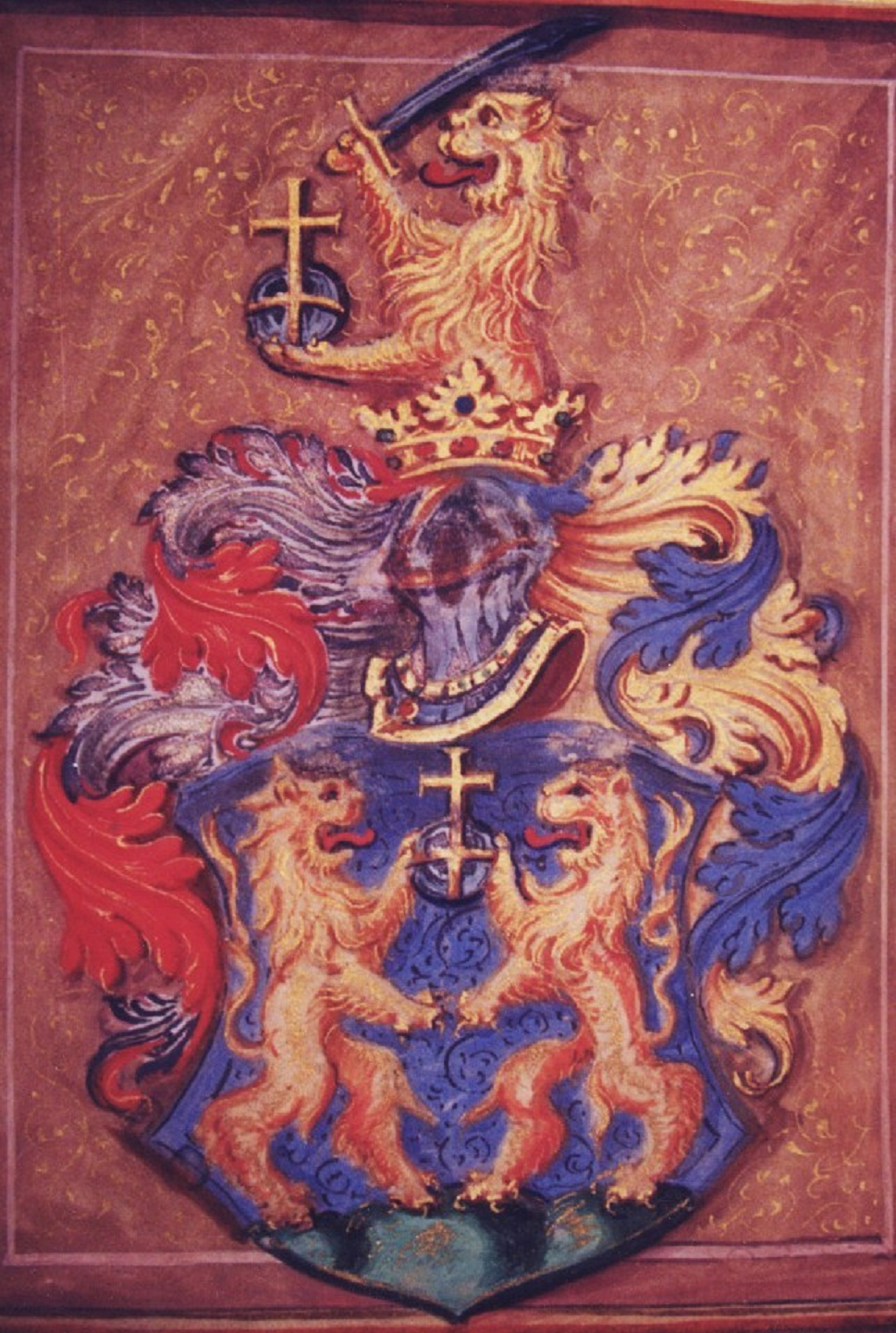 Älteste offizielle Wappendarstellung für das Geschlecht der Jelačić von Bužim: die Söhne des 1551 urkundlichen Marko (Markus) Jelačić, erhalten 1579 für ihre Verdienste in den Schlachten gegen die osmanischen Türken einen Adelsbrief, nämlich Ivan (Johann), Juraj (Georg), Nikola (Nikolaus), Petar (Peter) und Gabrijel (Gabriel), sowie deren Schwester Ana (Anna).